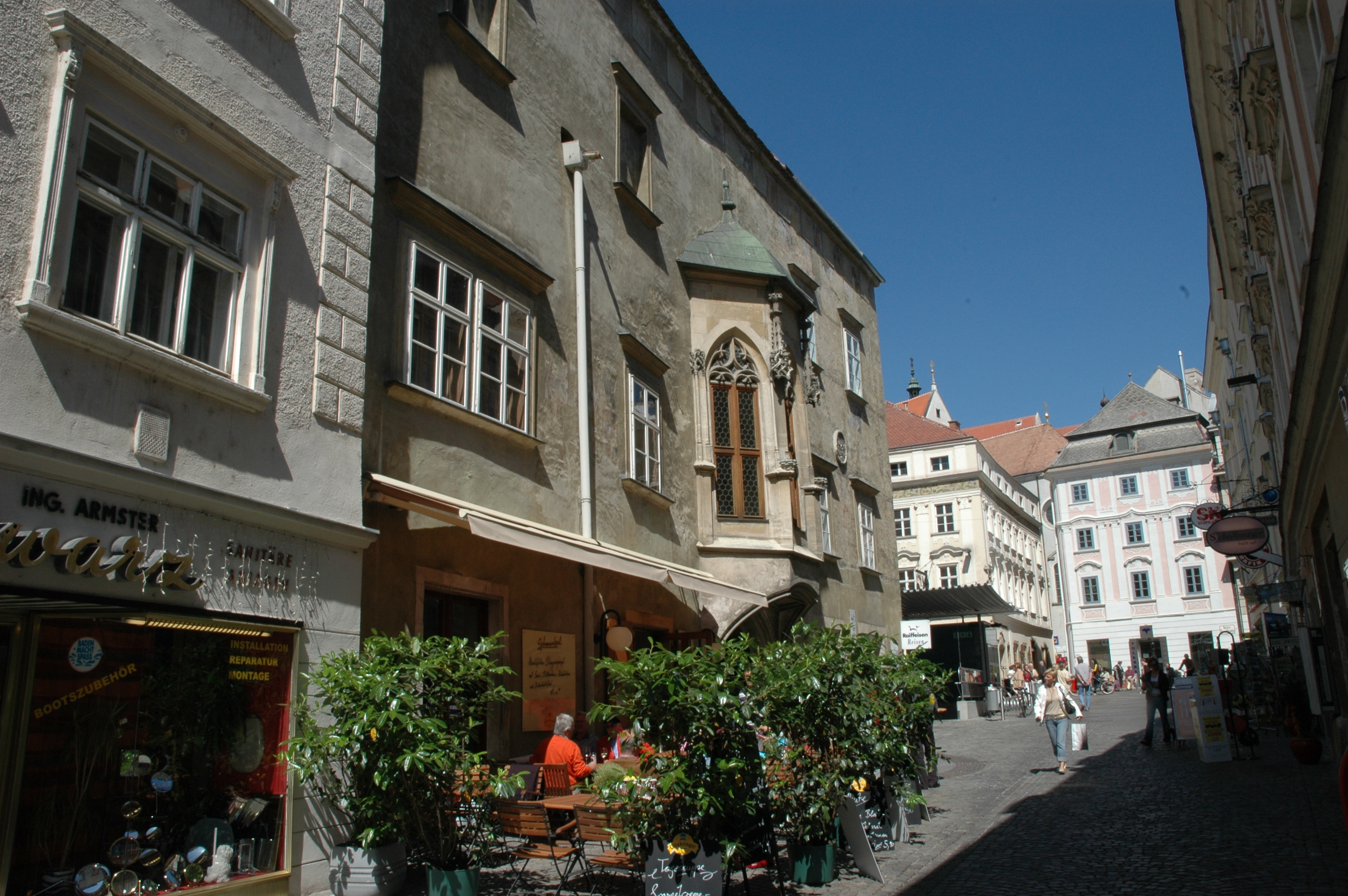 Göglhaus am "Täglichen Markt" in Krems